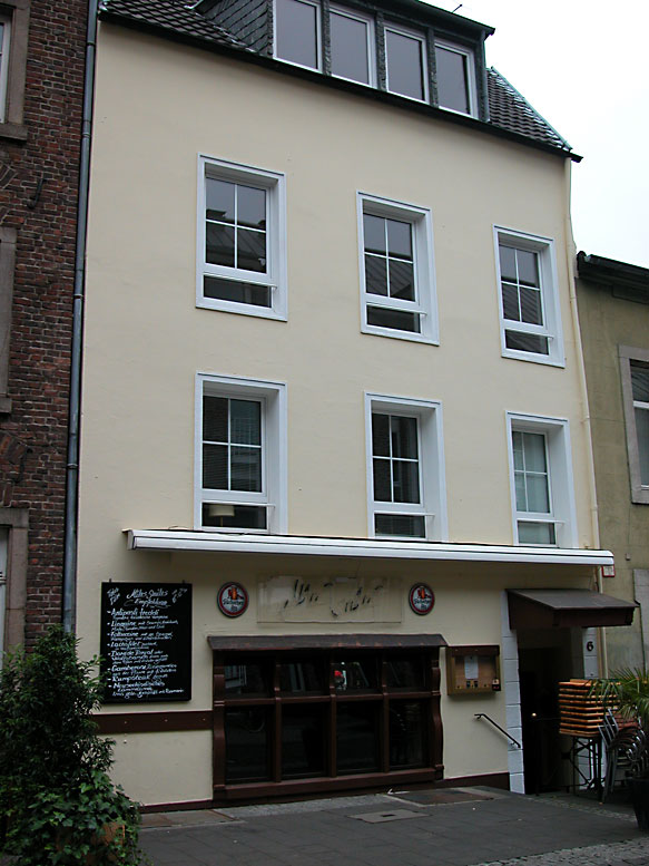 Akademiestraße 6, Düsseldorf-Altstadt. Vormals lange Zeit im Haus die Jazzkneipe Miles-Smiles. Danach wechselnde Pächter mit Bars zu nennen Red Lounge, Friends, Medusa Bar.